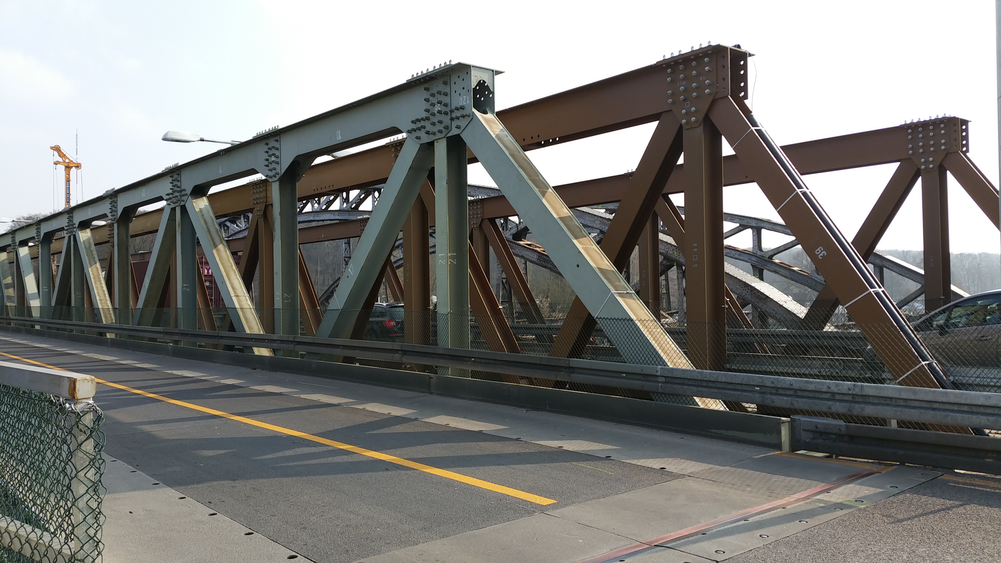 Detailaufnahme der Behelfsbrücken, die zZt. die Freybrücke ersetzen.